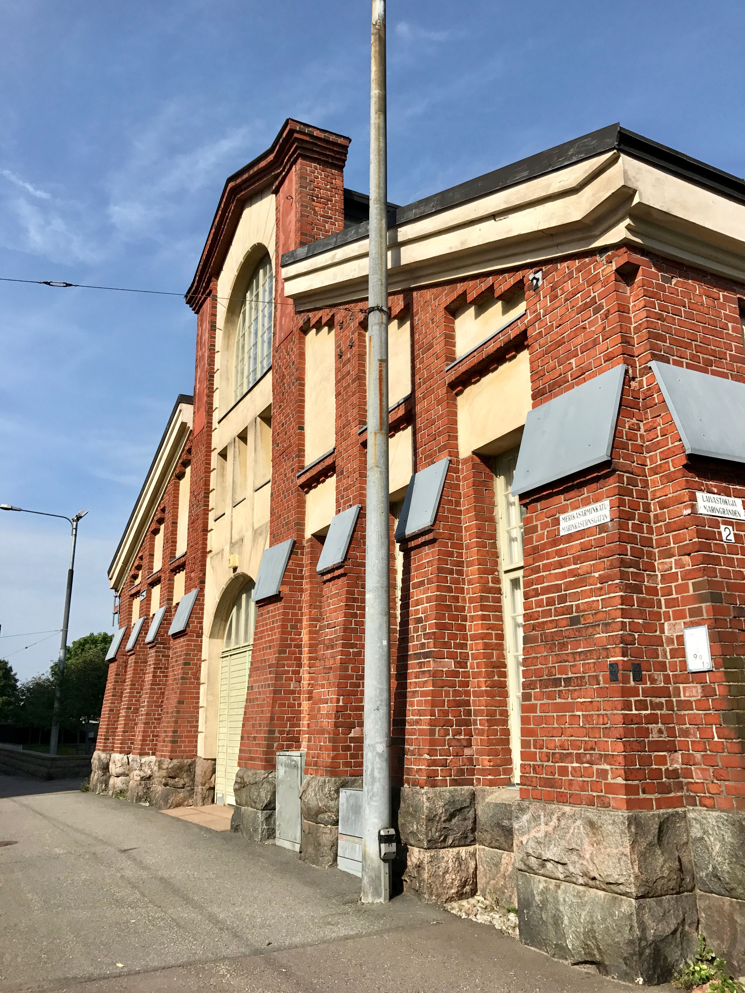 Katajanokan konepaja Helsingissä, osoitteessa Merikasarminkatu 1.